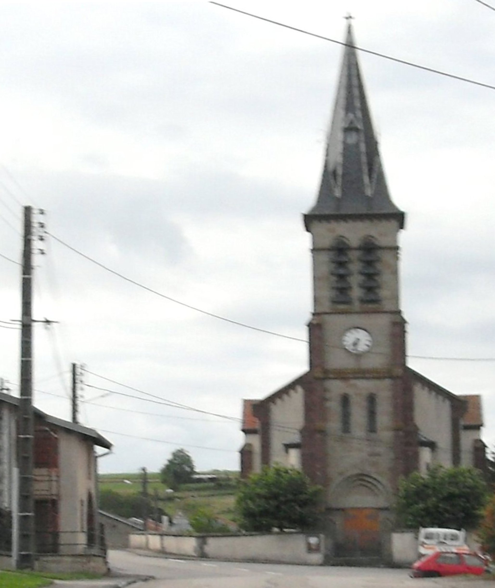 L'église Sainte-Colombe à Provenchères-lès-Darney